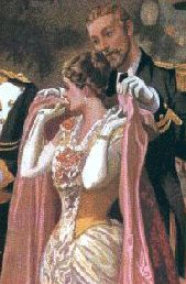 tableau ancien galanterie